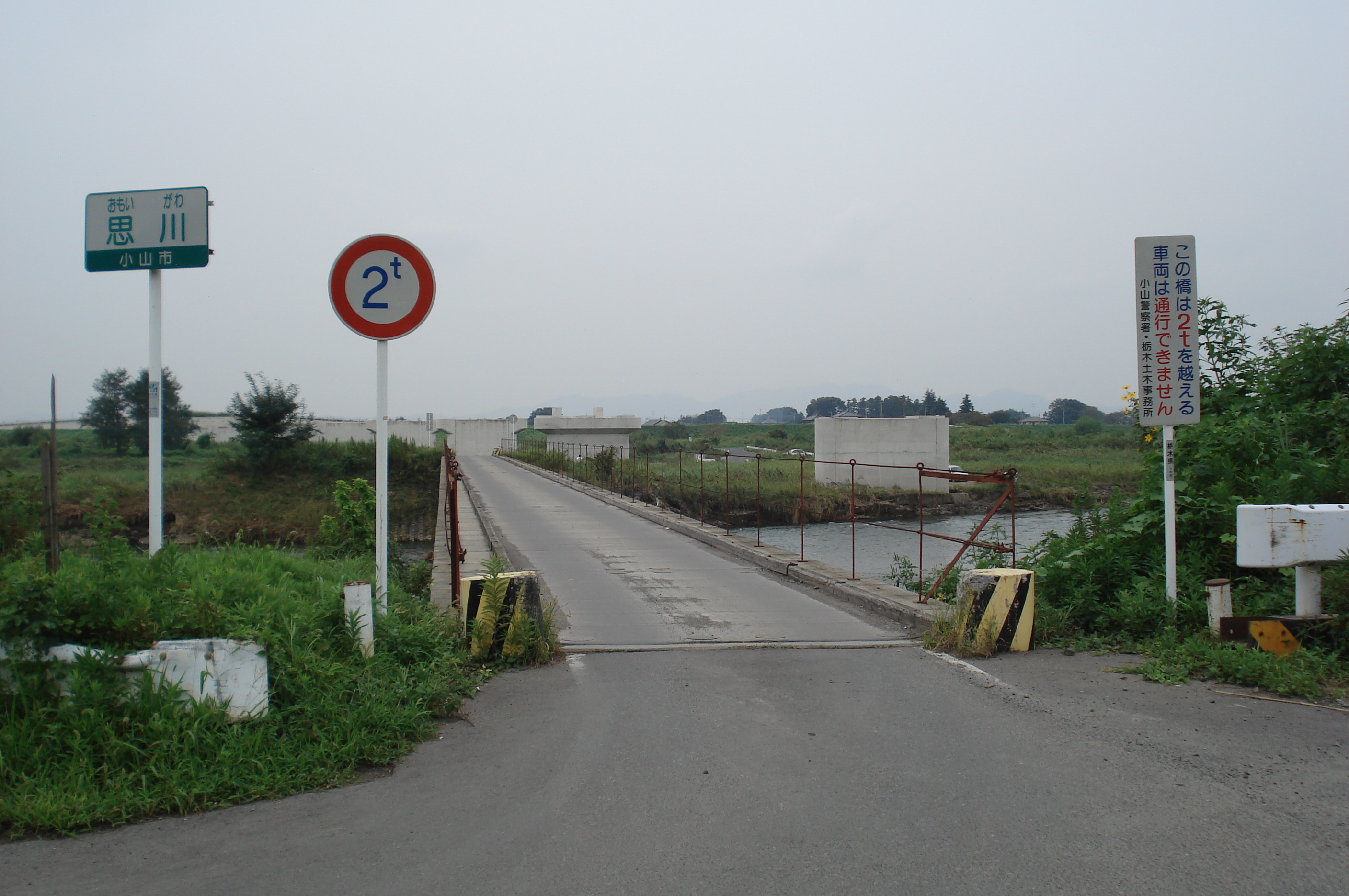 思川 間中橋（栃木県道33号小山環状線） 栃木県小山市間中